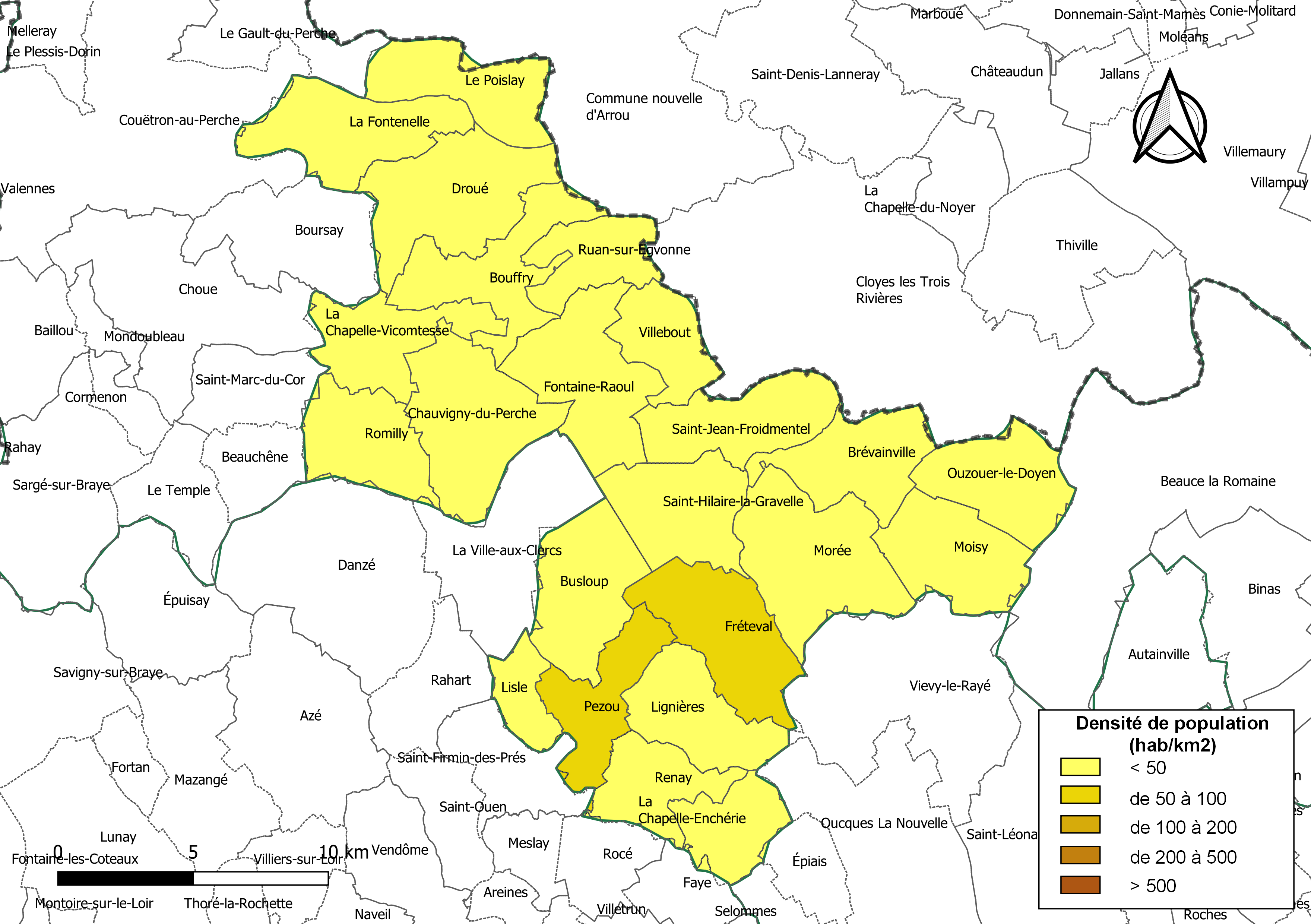 Carte des densités de population (millésimée 2016) des communes de la communauté de communes la Communauté de communes du Perche et Haut Vendômois, département de Loir-et-Cher, France. Composition au 1er janvier 2019.